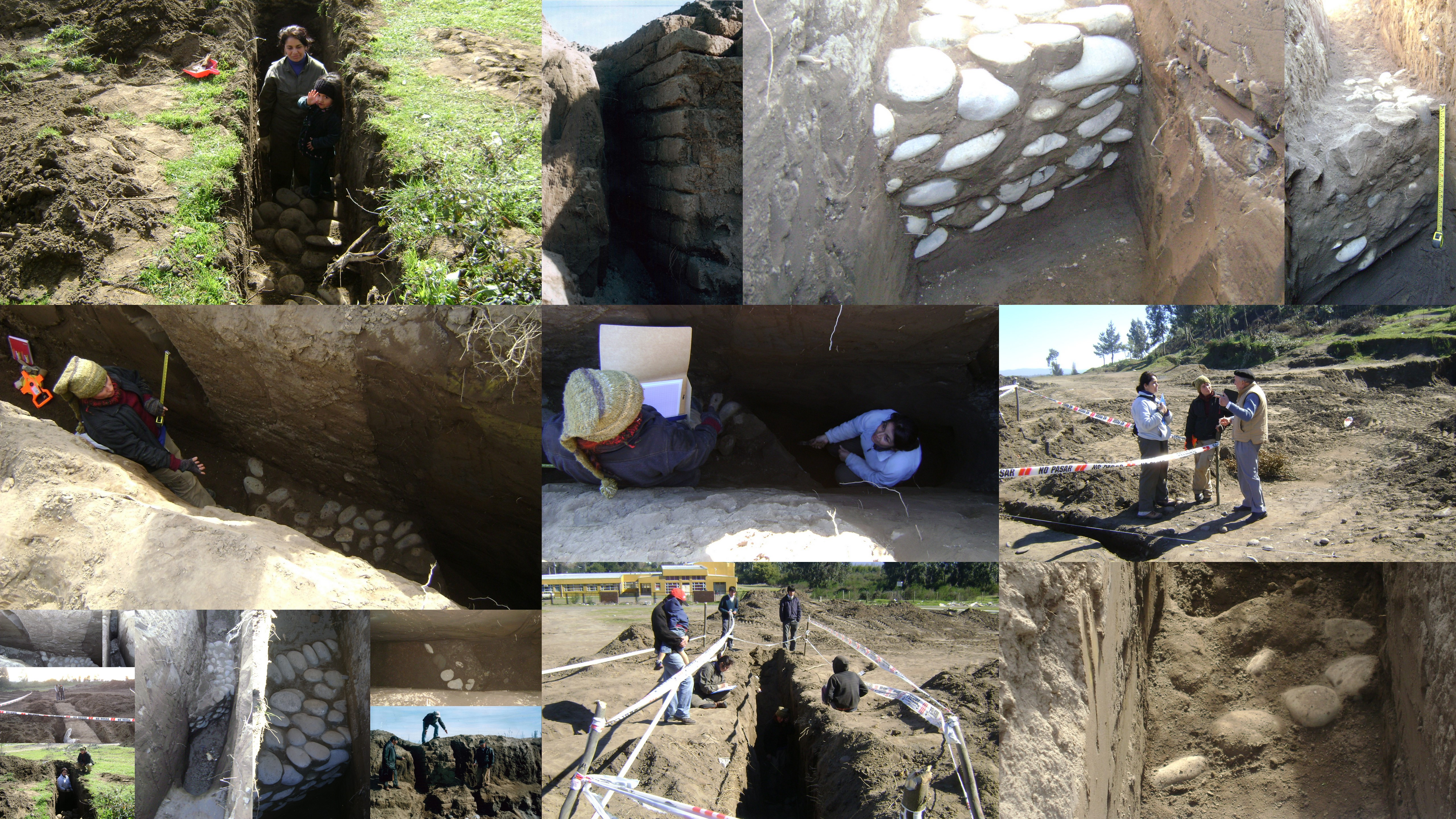 Muros de adobe con bases de bolones enterrados en el sitio Monumento Arqueologico de Negrete